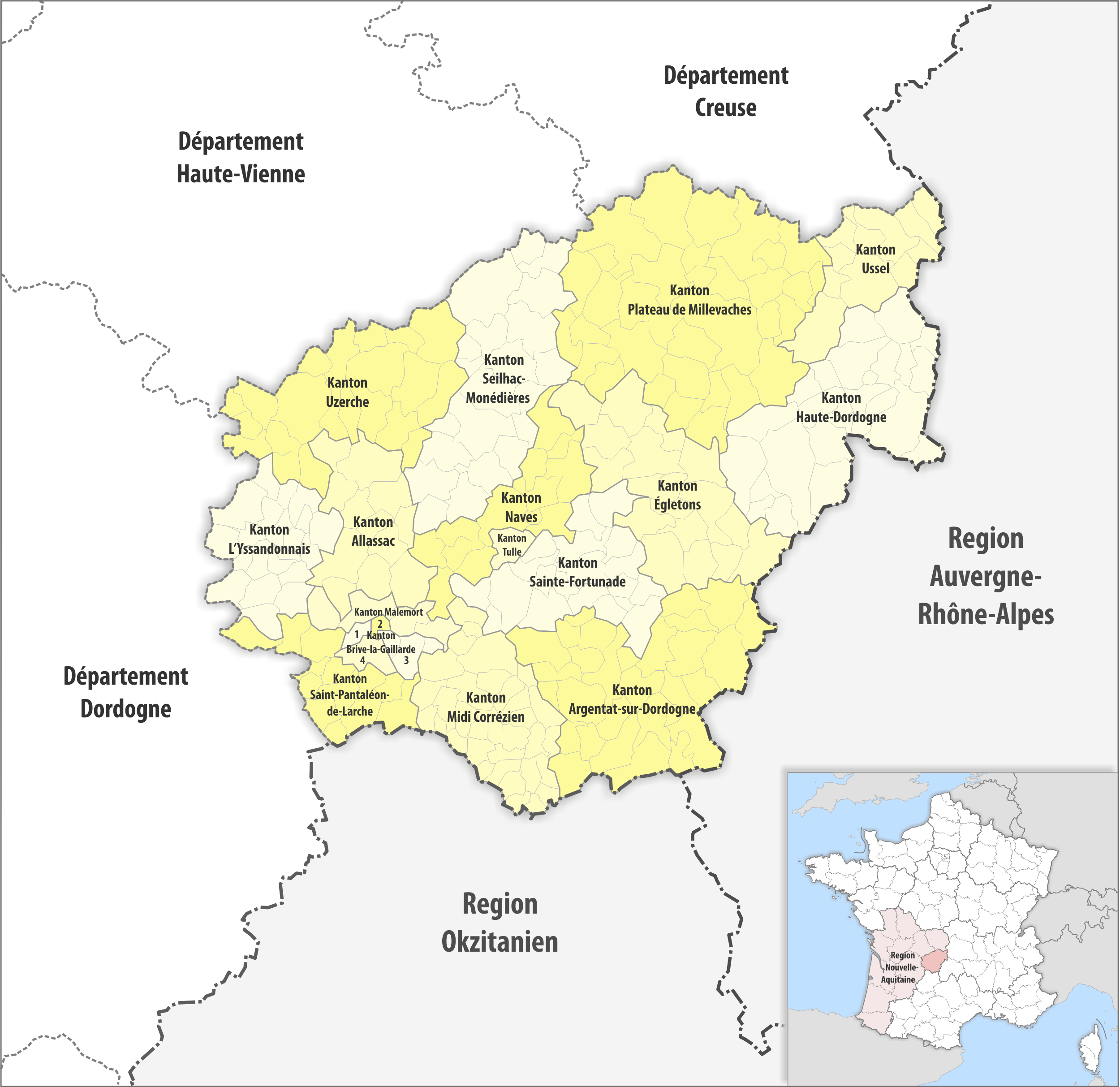 Gemeinden und Kantone im Departement Corrèze